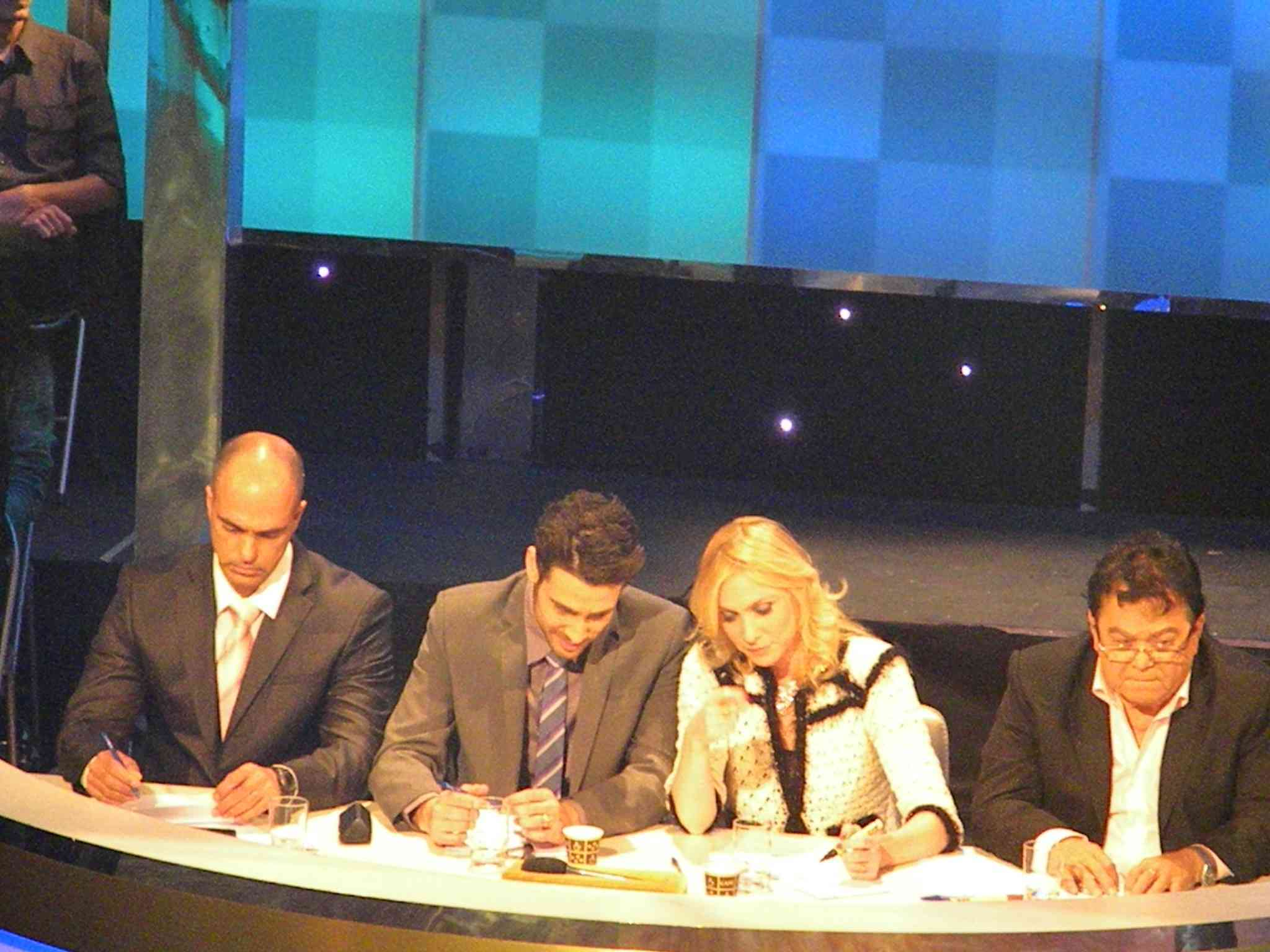 שופטים בעונה החמישית של רוקדים עם כוכבים